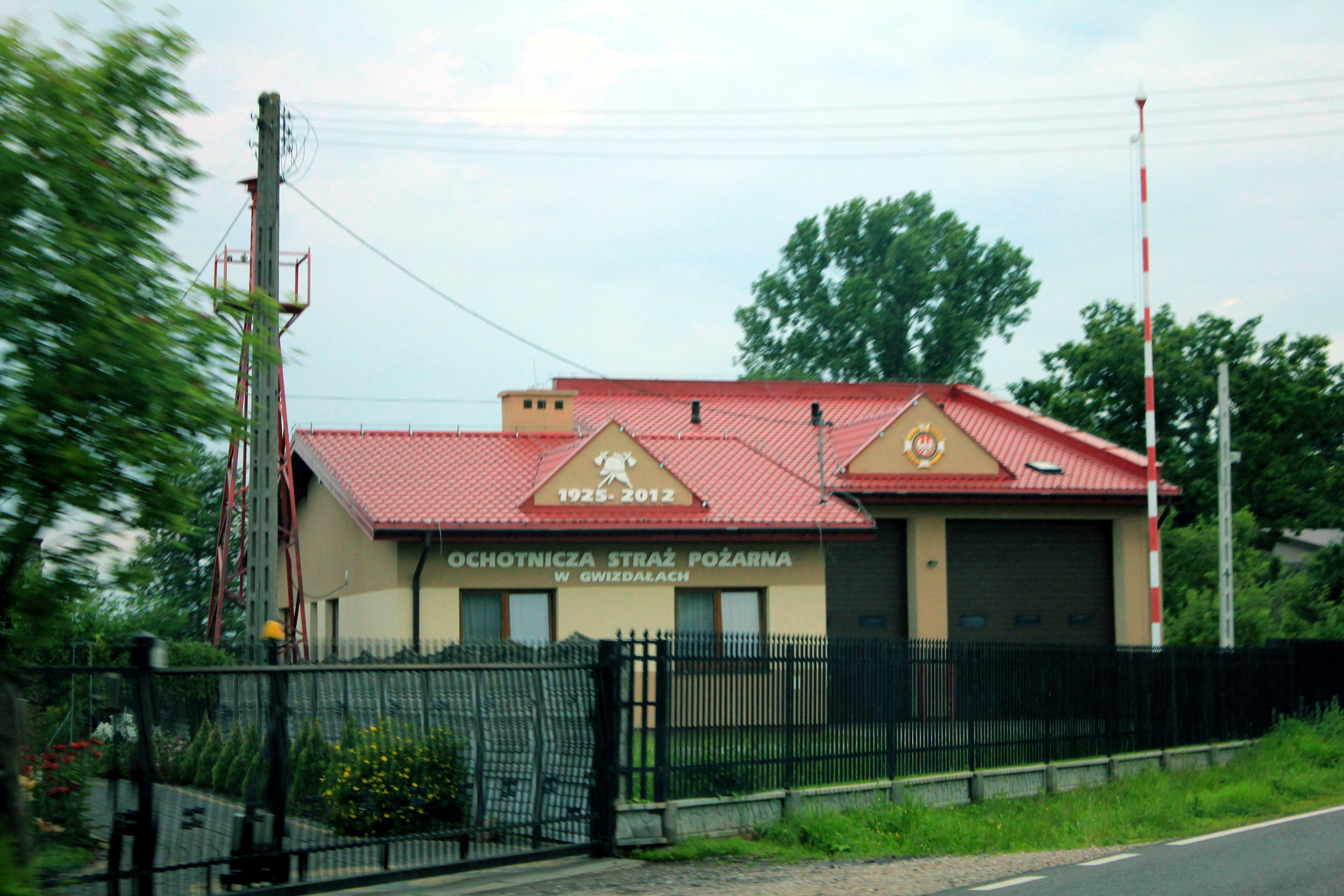 OSP w Gwizdałach - wsi w gminie Łochów, woj. mazowieckie